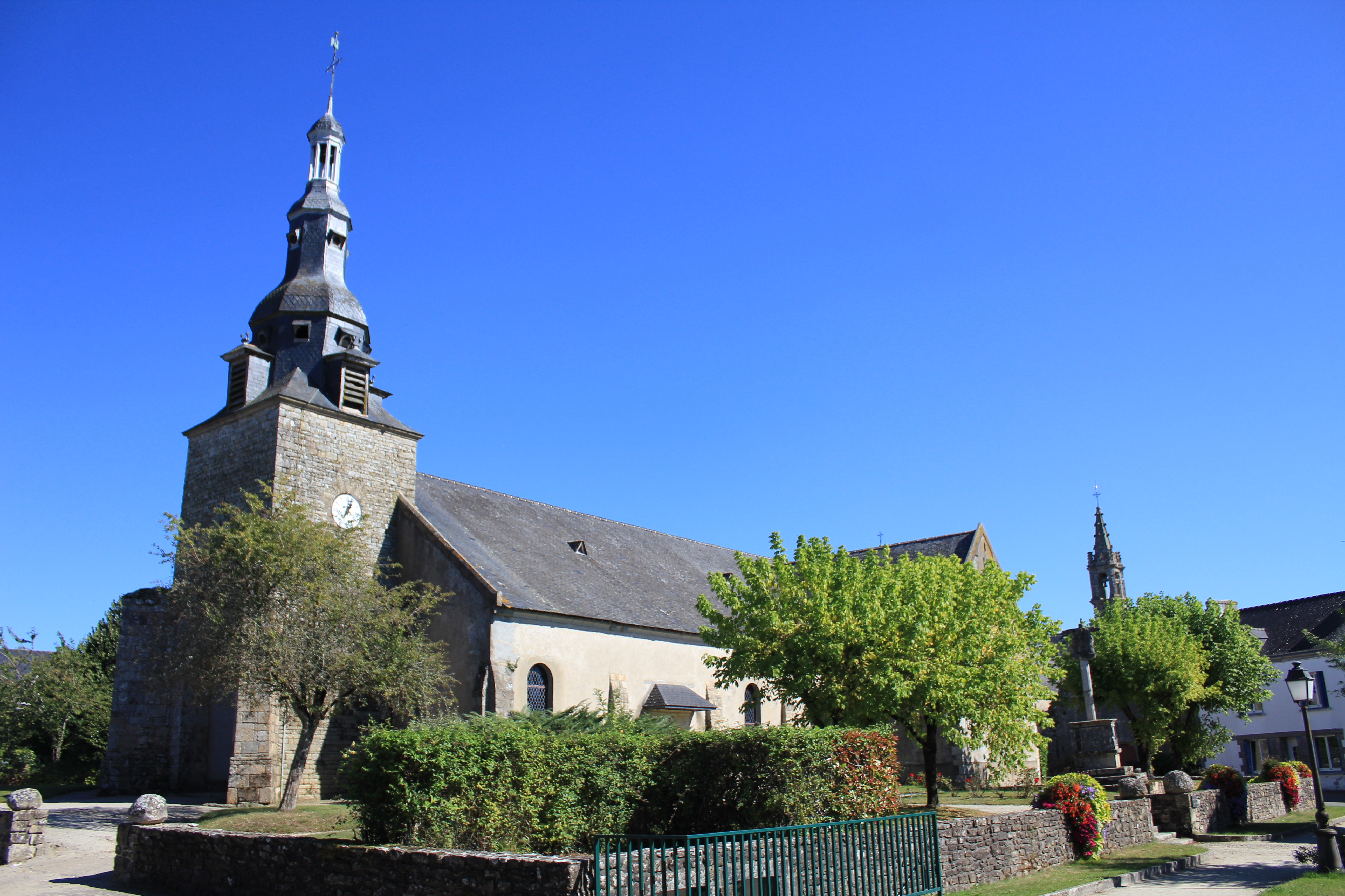 Église Saint-Thuriau (Plumergat) .